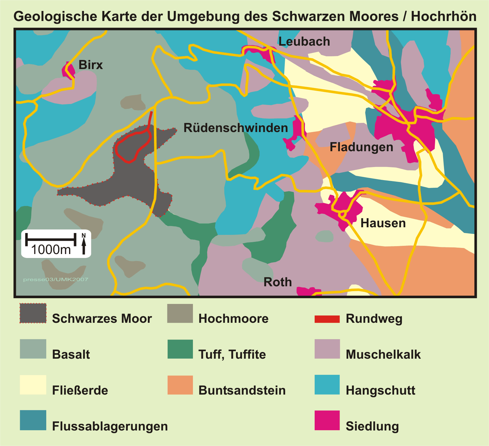 Geologische Karte der Umgebung des Schwarzen Moores in der Hochrhön, Deutschland